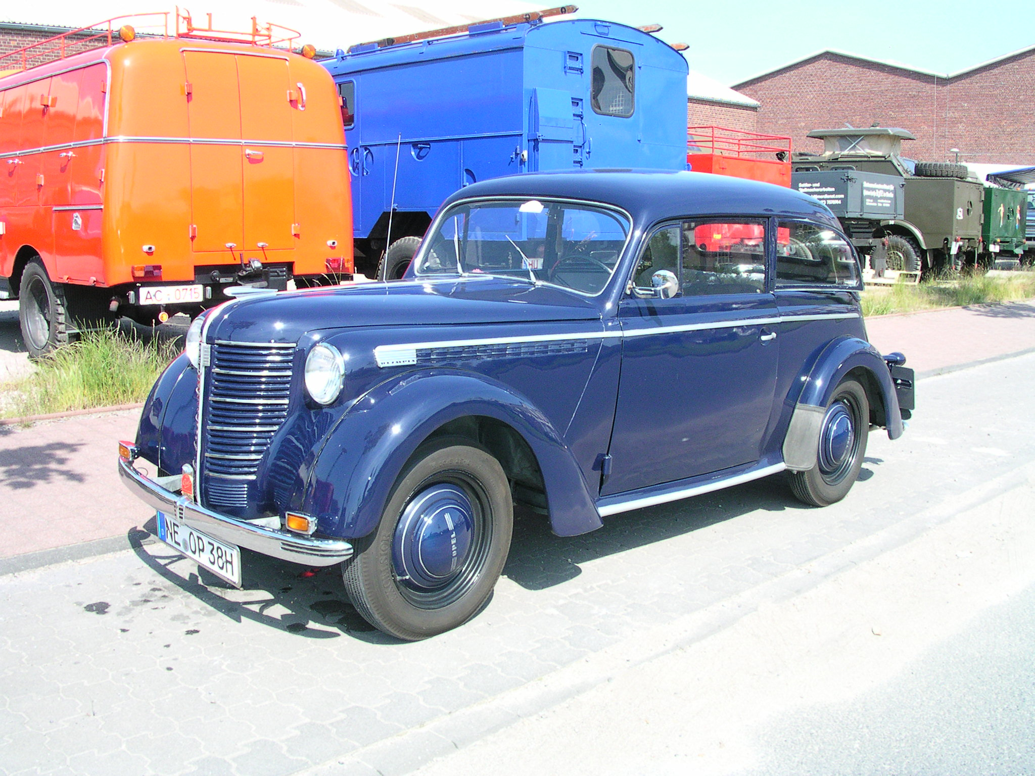 Willich, Borgward-Treffen im LKW-Museum, Opel Olympia